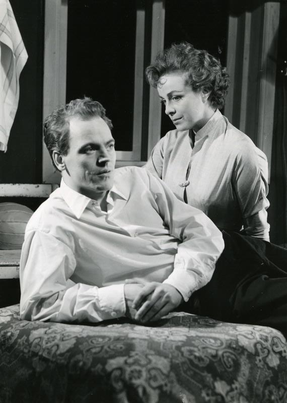 Svante Odqvist och Gunnel Broström i "The och sympati" på Helsingborgs stadsteater 1954/55.